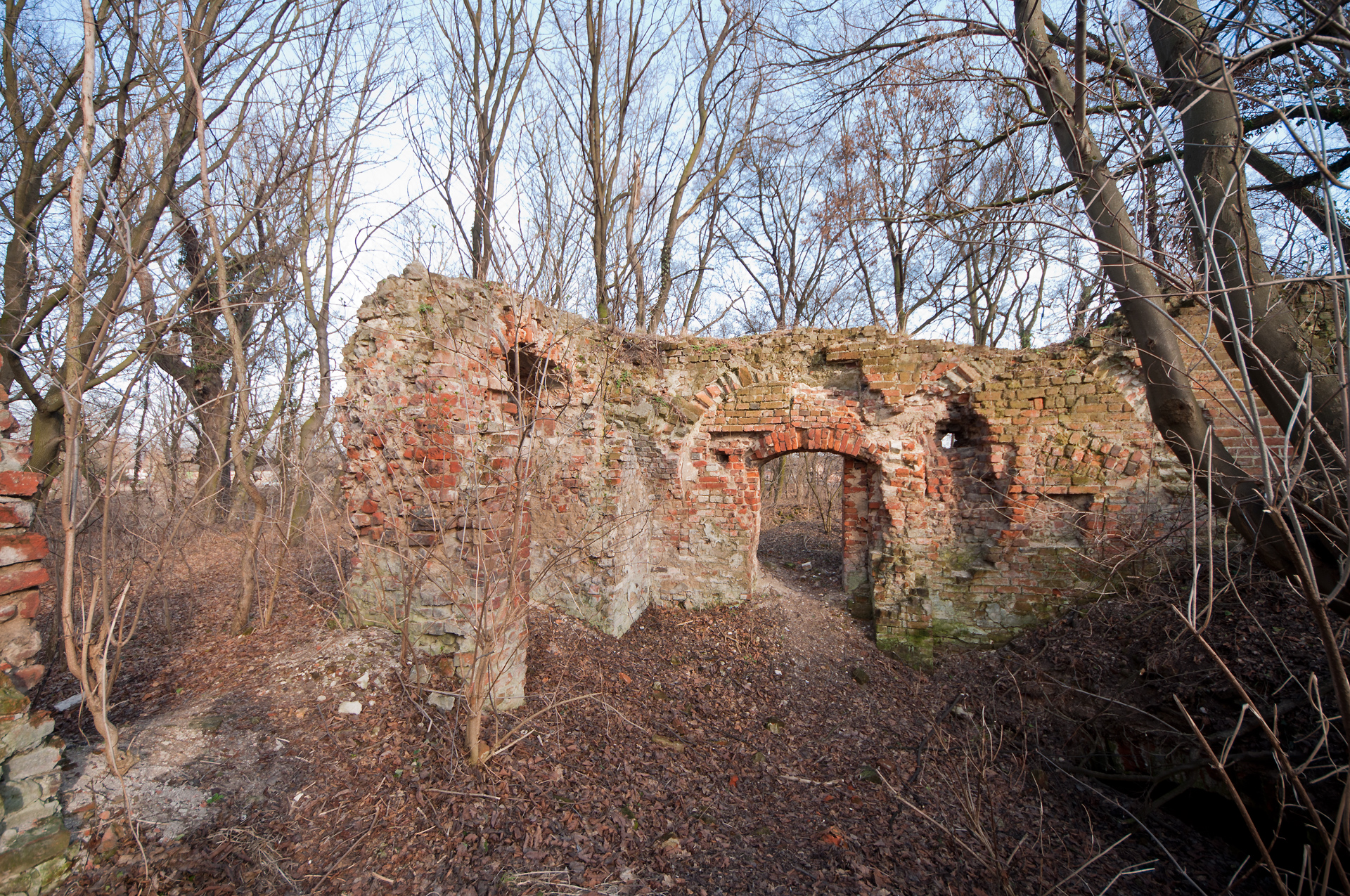 Zamek wodny (ruina) Jelcz-Laskowice, na półwyspie, Jelcz-Laskowice